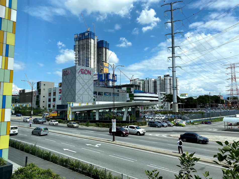 馬來西亞的永旺百貨公司